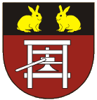 znak obce